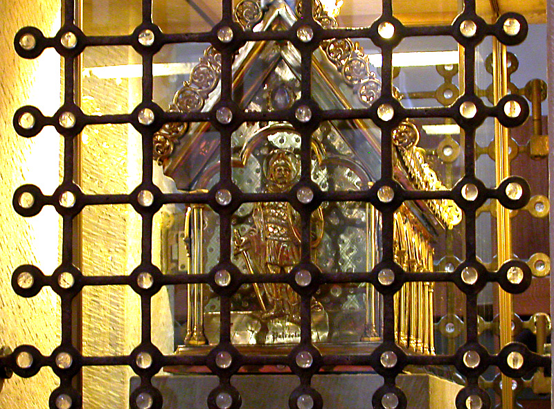 Patroclus-Schrein mit Reliquien, Soest Dom (Propstkirche), NRW, Deutschland